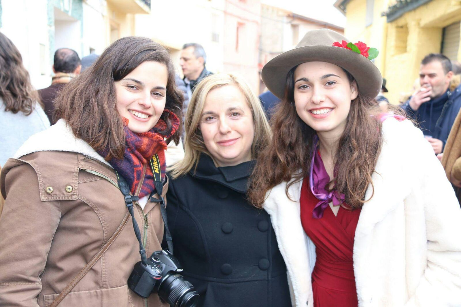 Dia de Quintos en Aguarón 2017